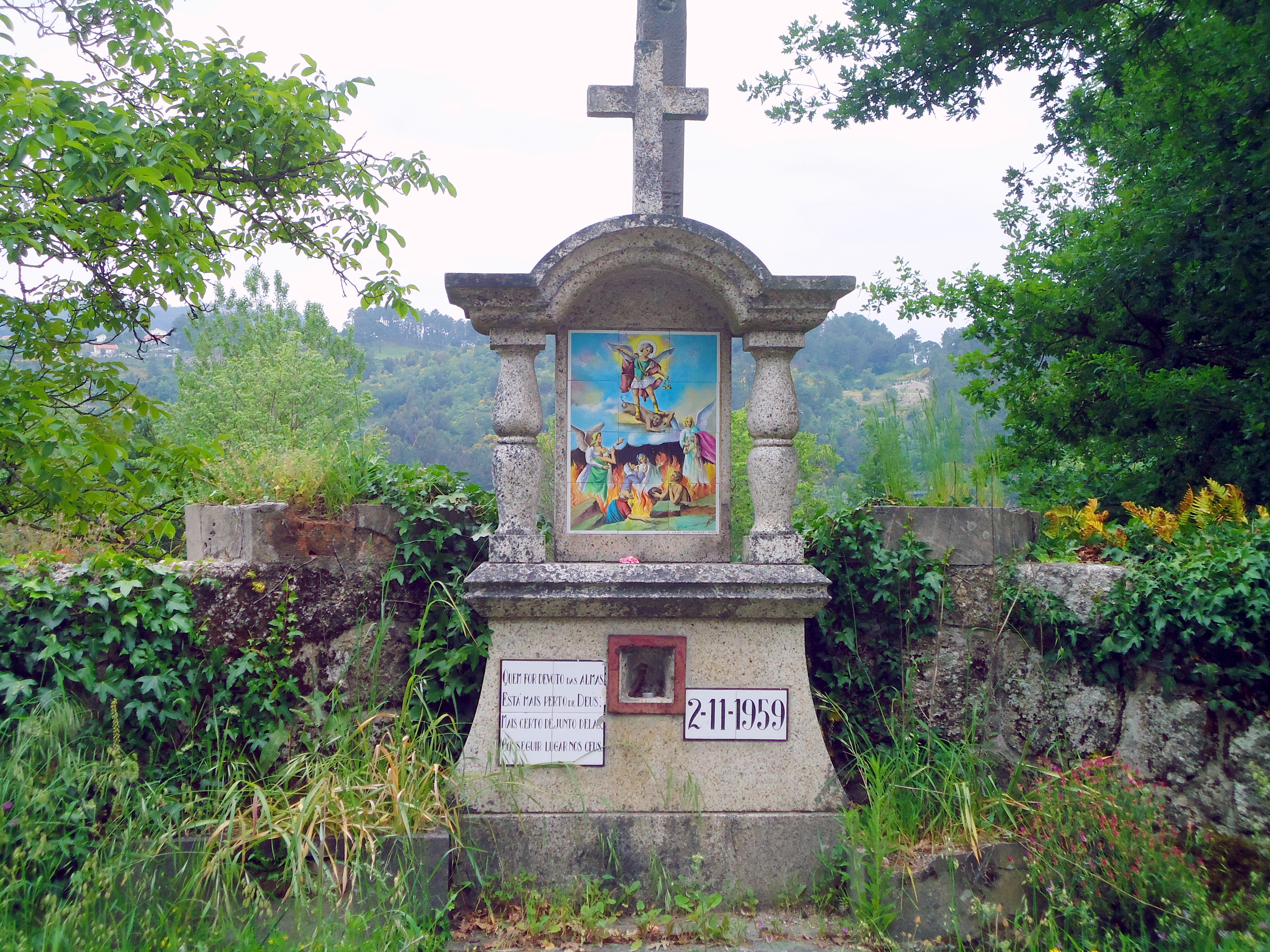 Amarante salvador